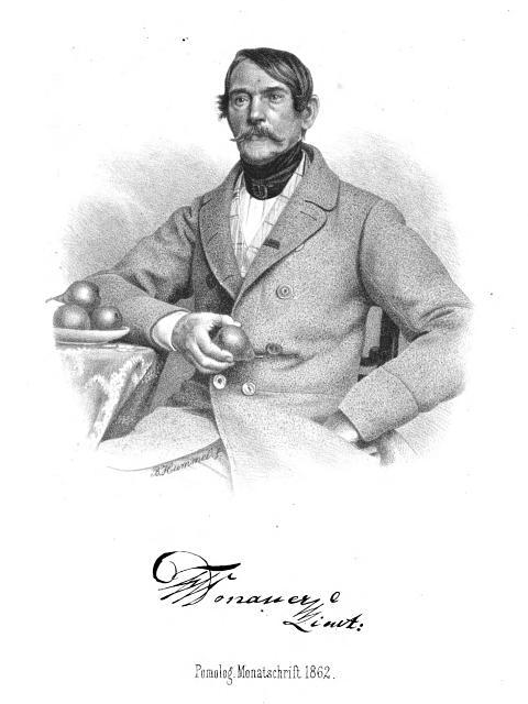 Lt. F. W. Donauer, Porträt mit Signatur